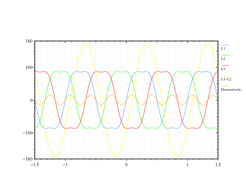 Differenzspannung zwischen zwei Phasen einer Drehstromquelle, die mit einer dritten Harmonischen beaufschlagt sind